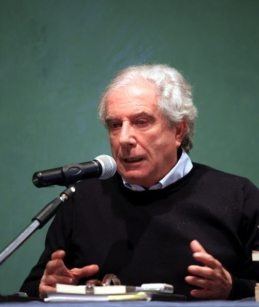 Italo Moscati